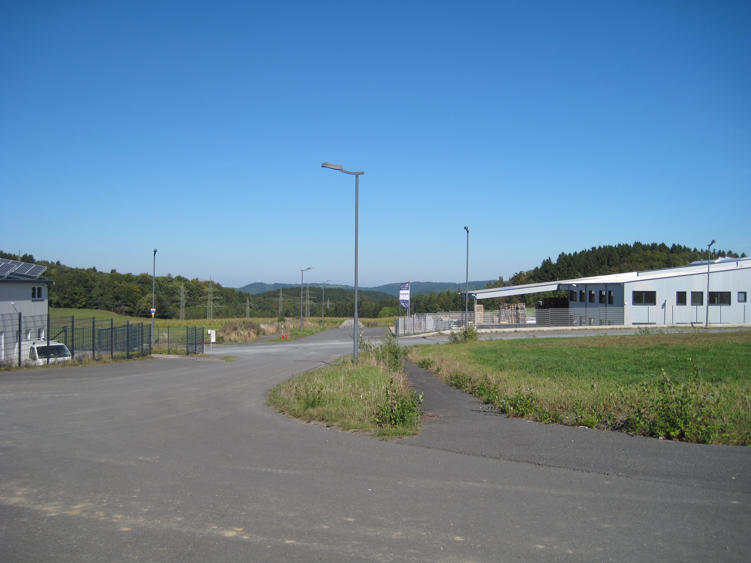 Gewerbegebiet Rosmart, östlich der Ortschaft Altena-Rosmart.